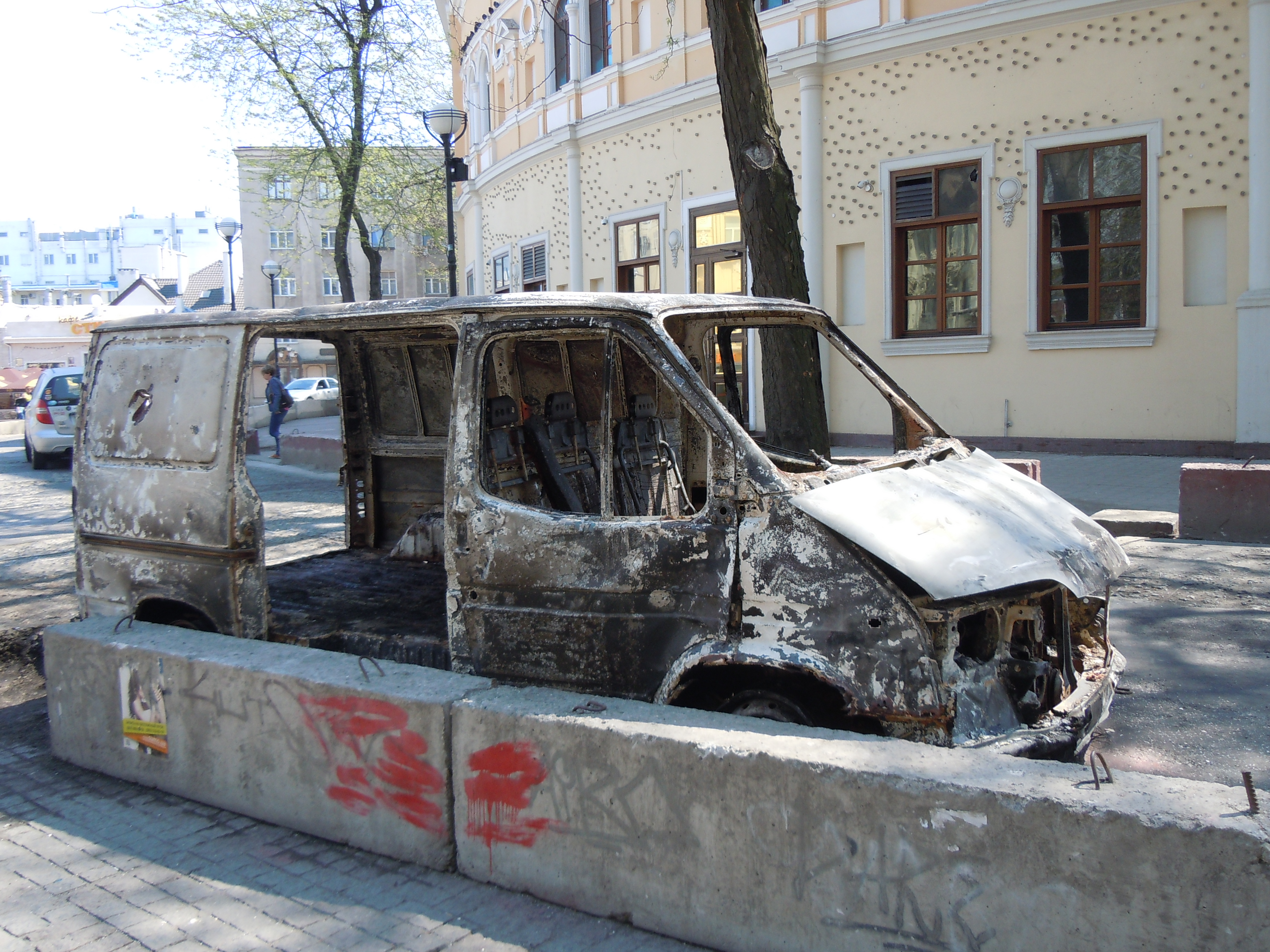 Мікроавтобус російських нападників, що згорів під час сутичок в Одесі 02.05.2014